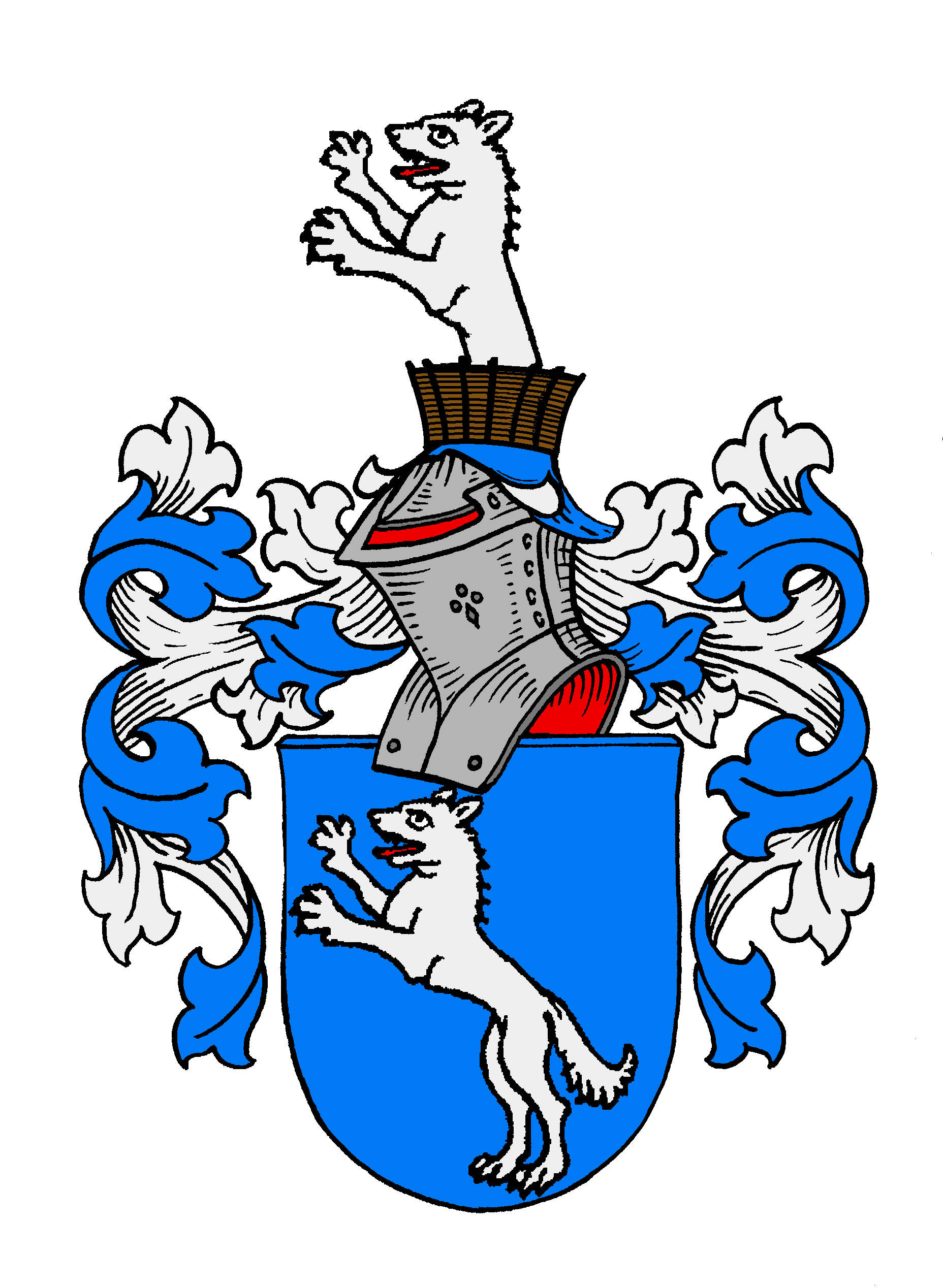 Stammwappen der von Pogwisch sowie der von Wisch, in den Herzogtümern Schleswig und Holstein zu den Equites Originarii gehörend.